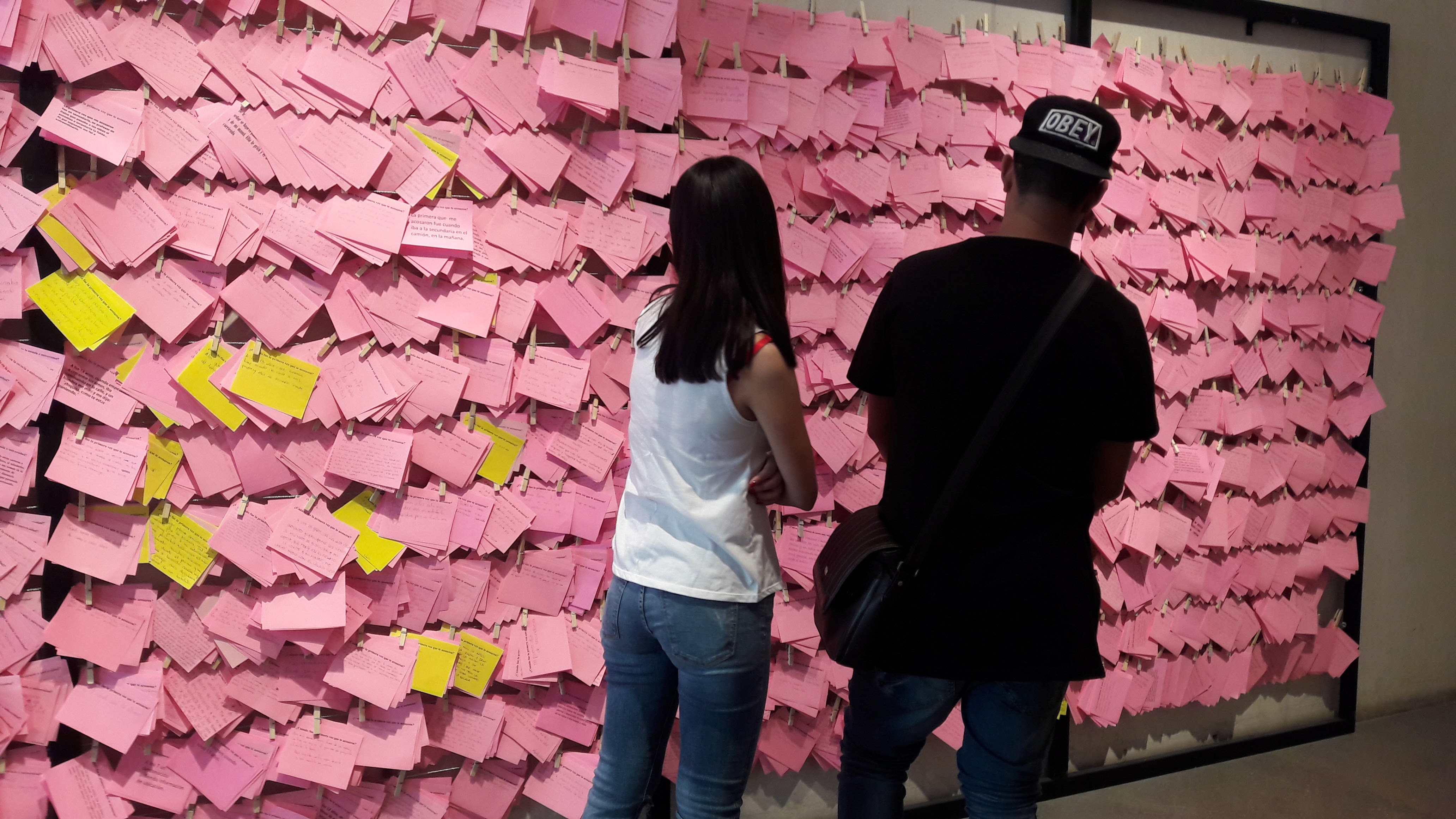 Reactivación de la obra participativa El Tendedero de Mónica Mayer en el Museo Universitario Arte Contemporáneo, Ciudad de México, mayo 2016, en el contexto de la exposición "Si tiene dudas... pregunté: una exposición retrocolectiva de Mónica Mayer".